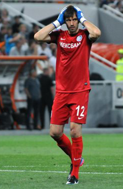 Дмитро Безотосний - український футболіст, воротар.